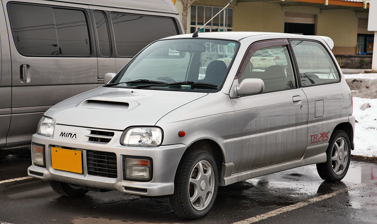 Daihatsu Mira 660 Tutbo TR-XX Avanzato R ( L502S )